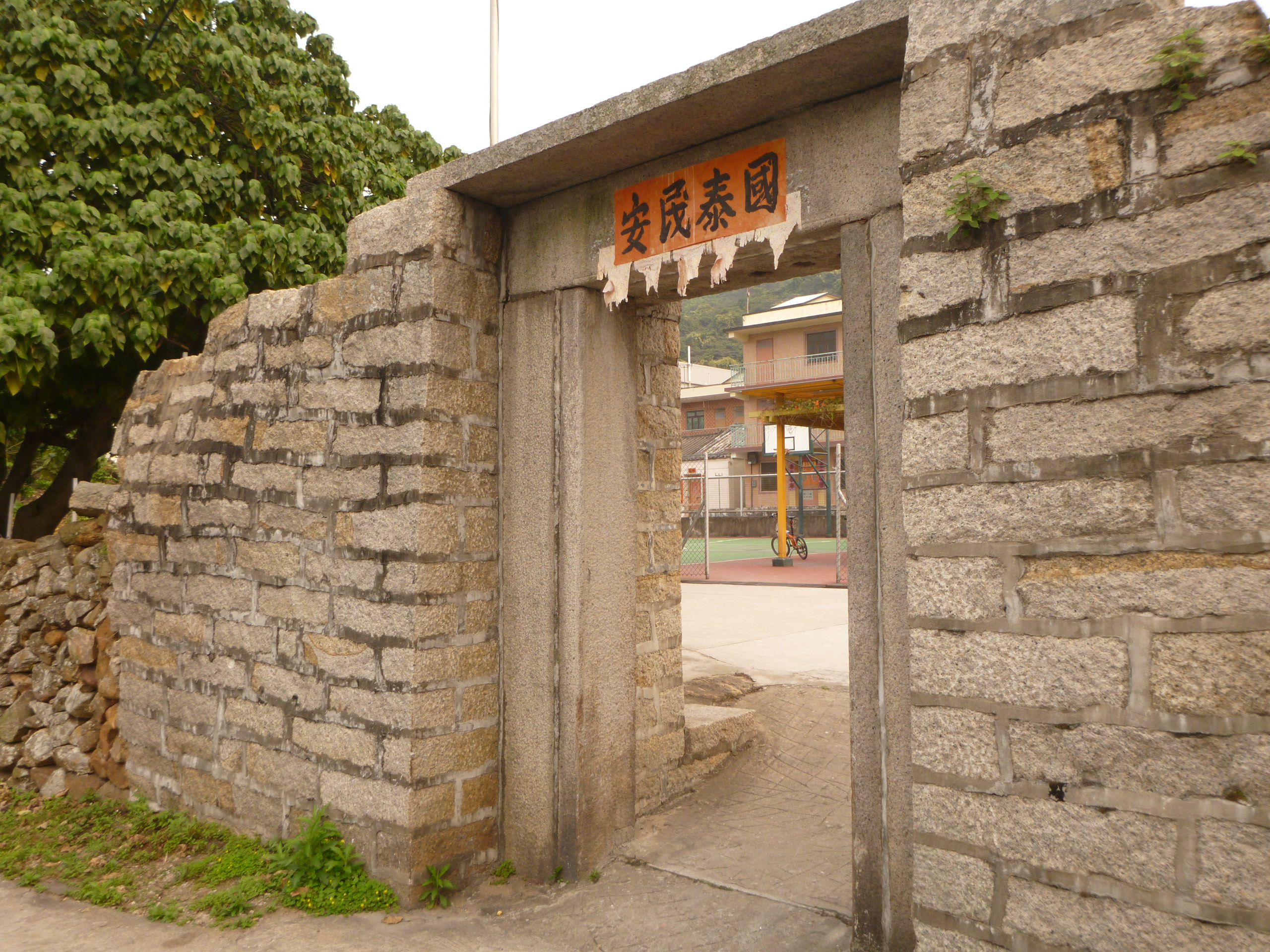 沙螺灣圍牆入口